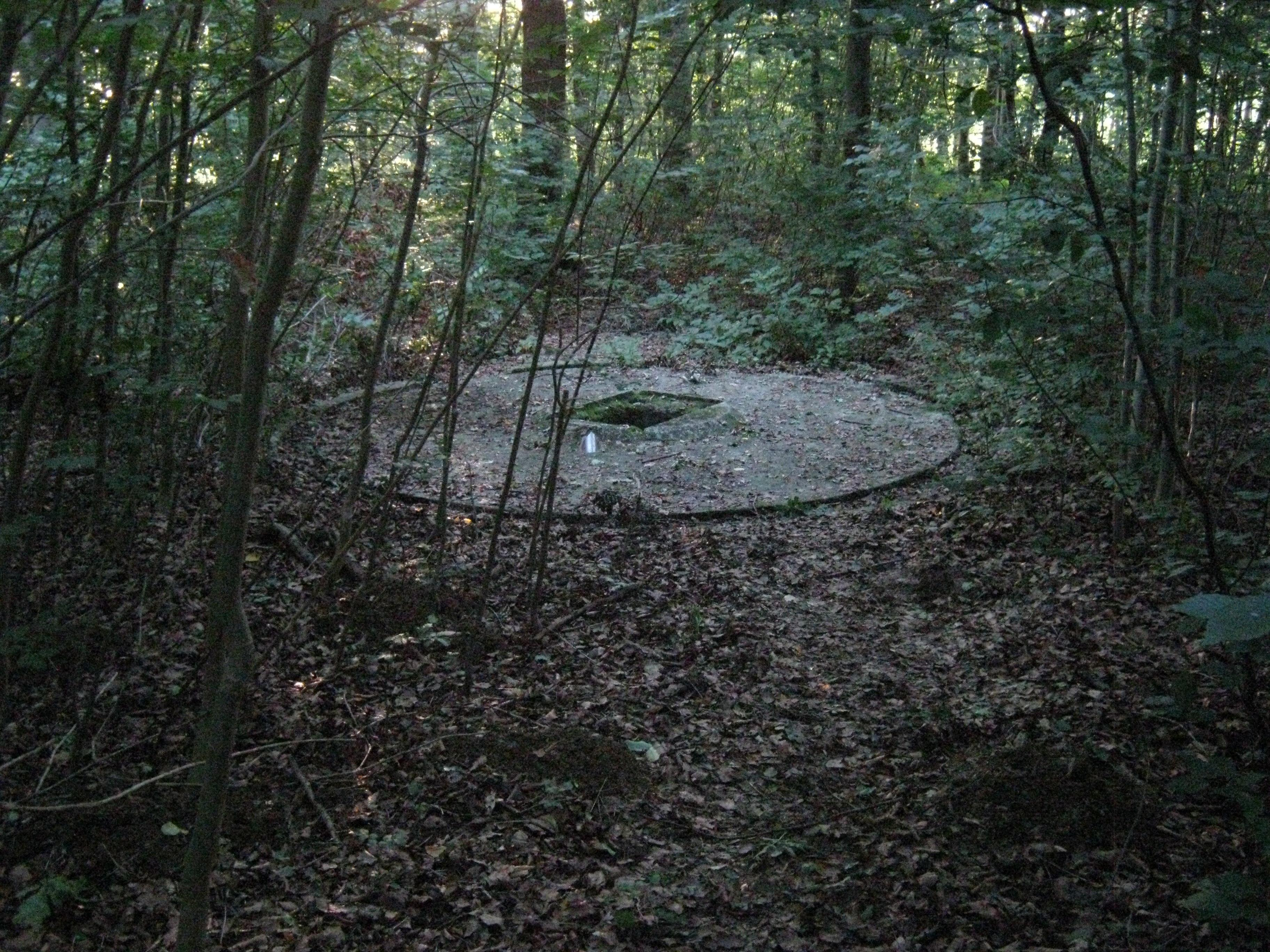 Ehemalige Natter-Startstelle Kirchheim/Teck Nordwest